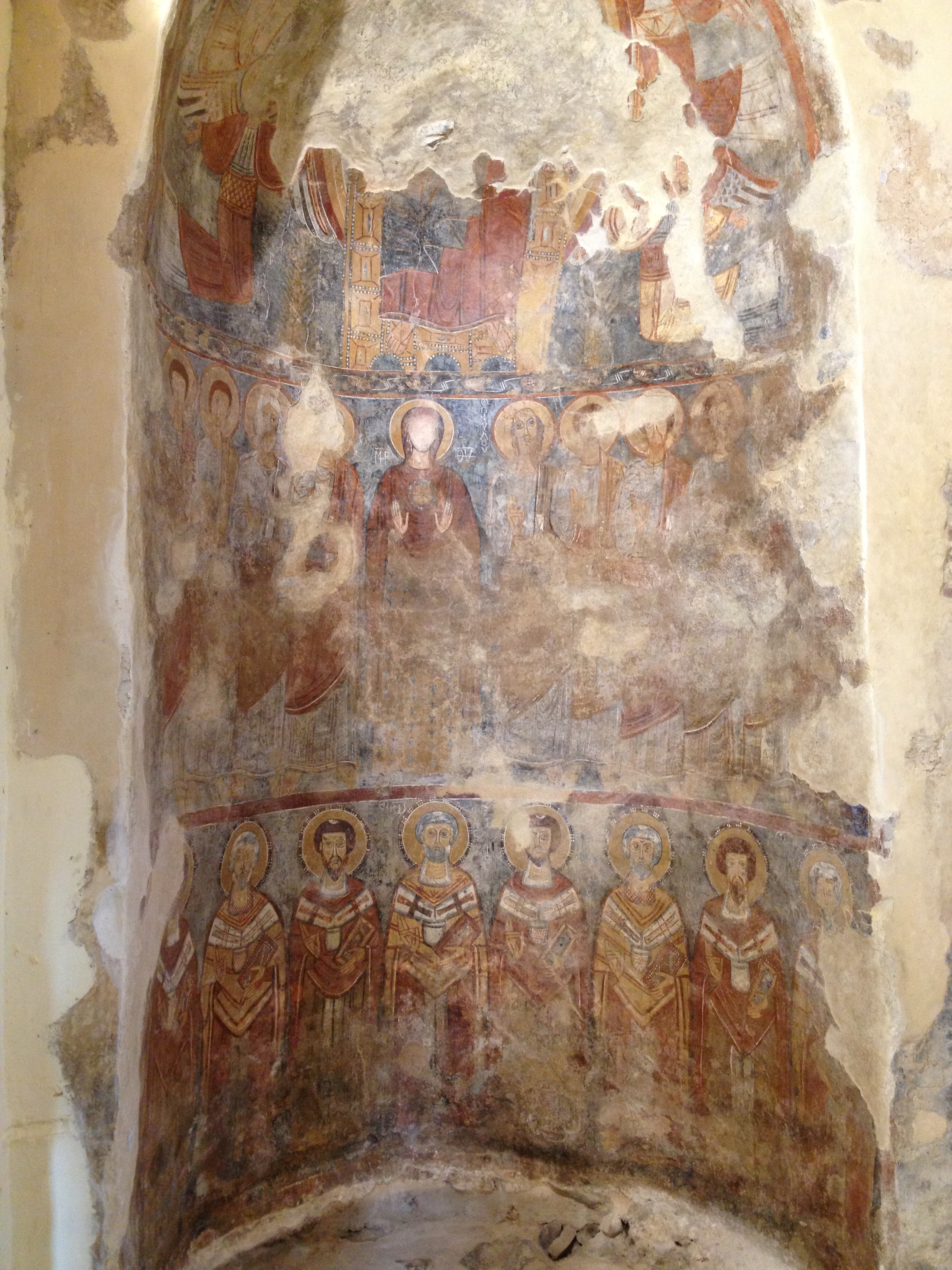 Affresco dell'abside della chiesa di San Filadelfo - Badia di Santa Maria di Pattano (Vallo della Lucania).